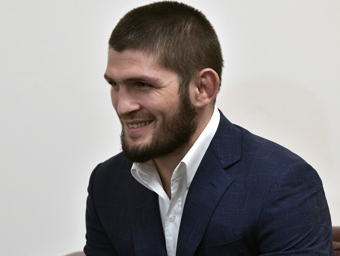 Хабиб Нурмагомедов на встрече с В. Путиным. 12.9.2019 г.